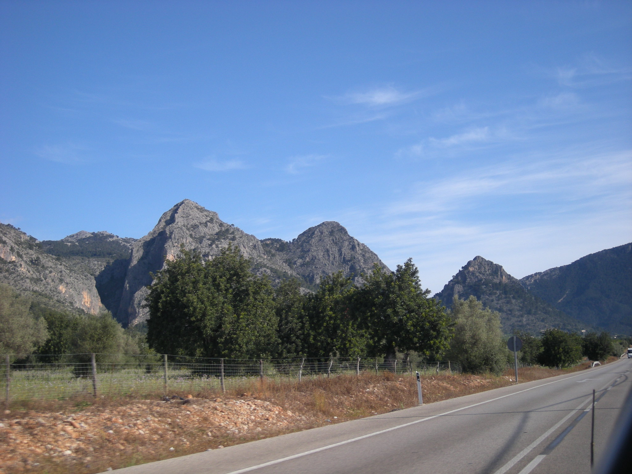 Ma-11. Carretera de Sóller. Al fons, Sa Gubia, el Puig de Son Nasi i el Puig de Son Poc (d'esquerra a dreta).